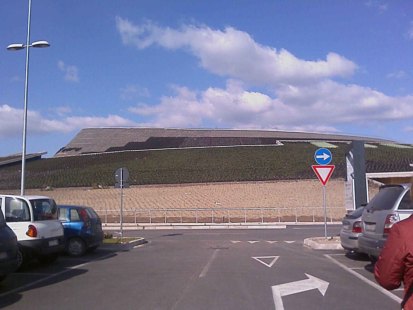 Exerior of Vulcano Buono by Renzo Piano